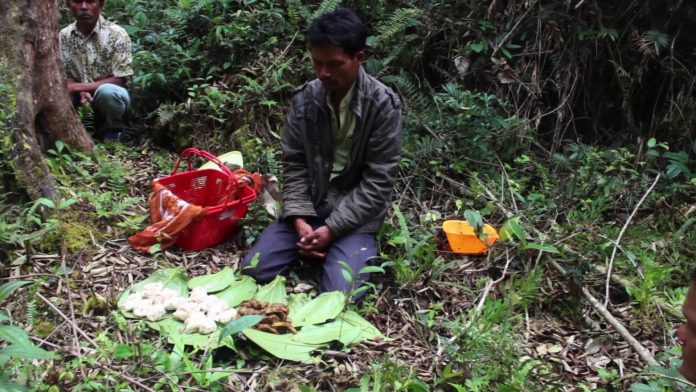 Seorang pria sedang melakukan ritual Mangarontas di Kabupaten Humbang Hasundutan, Sumatera Utara